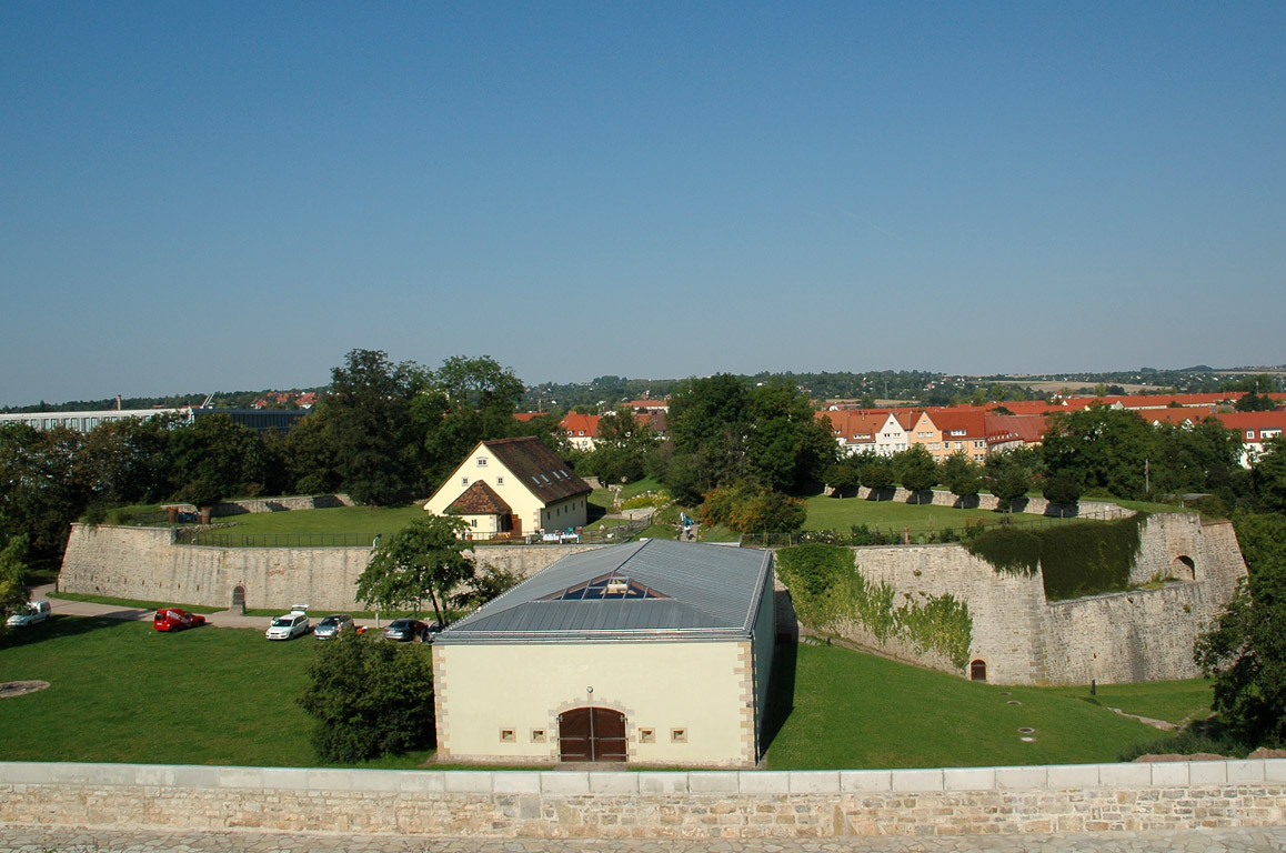 Ravelin Anselm (errichtet zwischen 1679 und 1680) mit dem Friedenspulvermagazin Nr.5 (errichtet 1822), im Vordergrund die Geschützkaponniere Nr. 1 (errichtet zwischen 1824 und 1826) der Zitadelle Petersberg in Erfurt